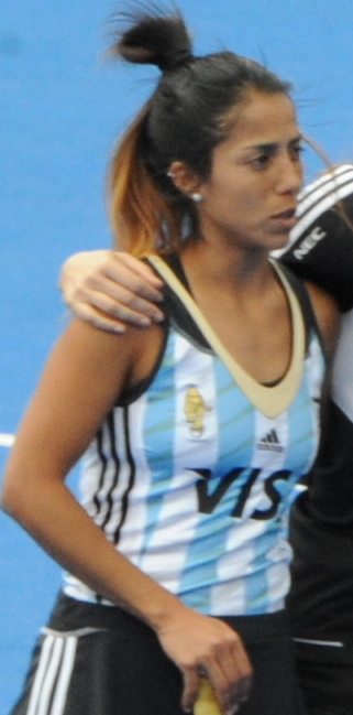 GB v Argentina 2016 CT